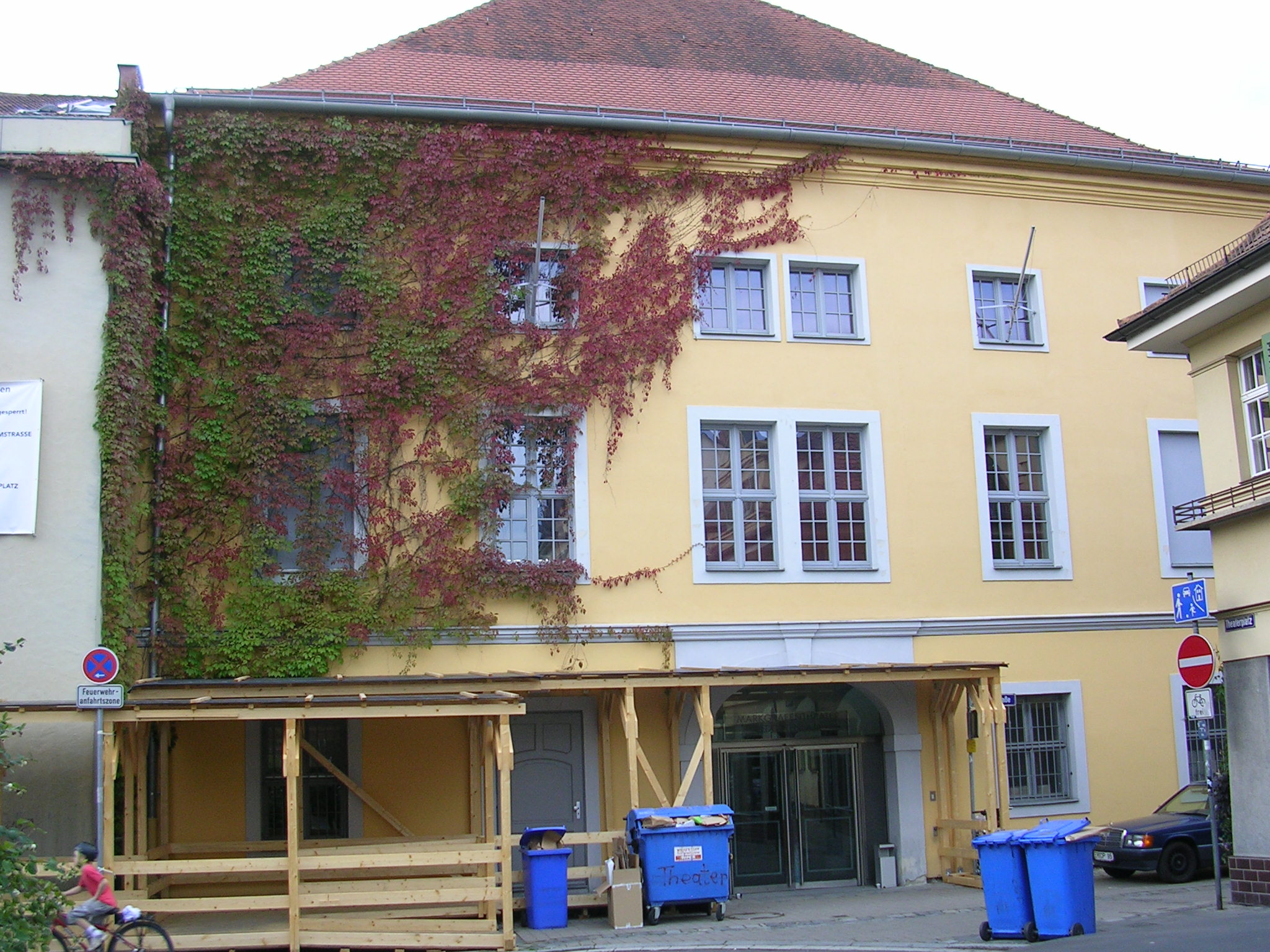 Redoutenhaus in Erlangen